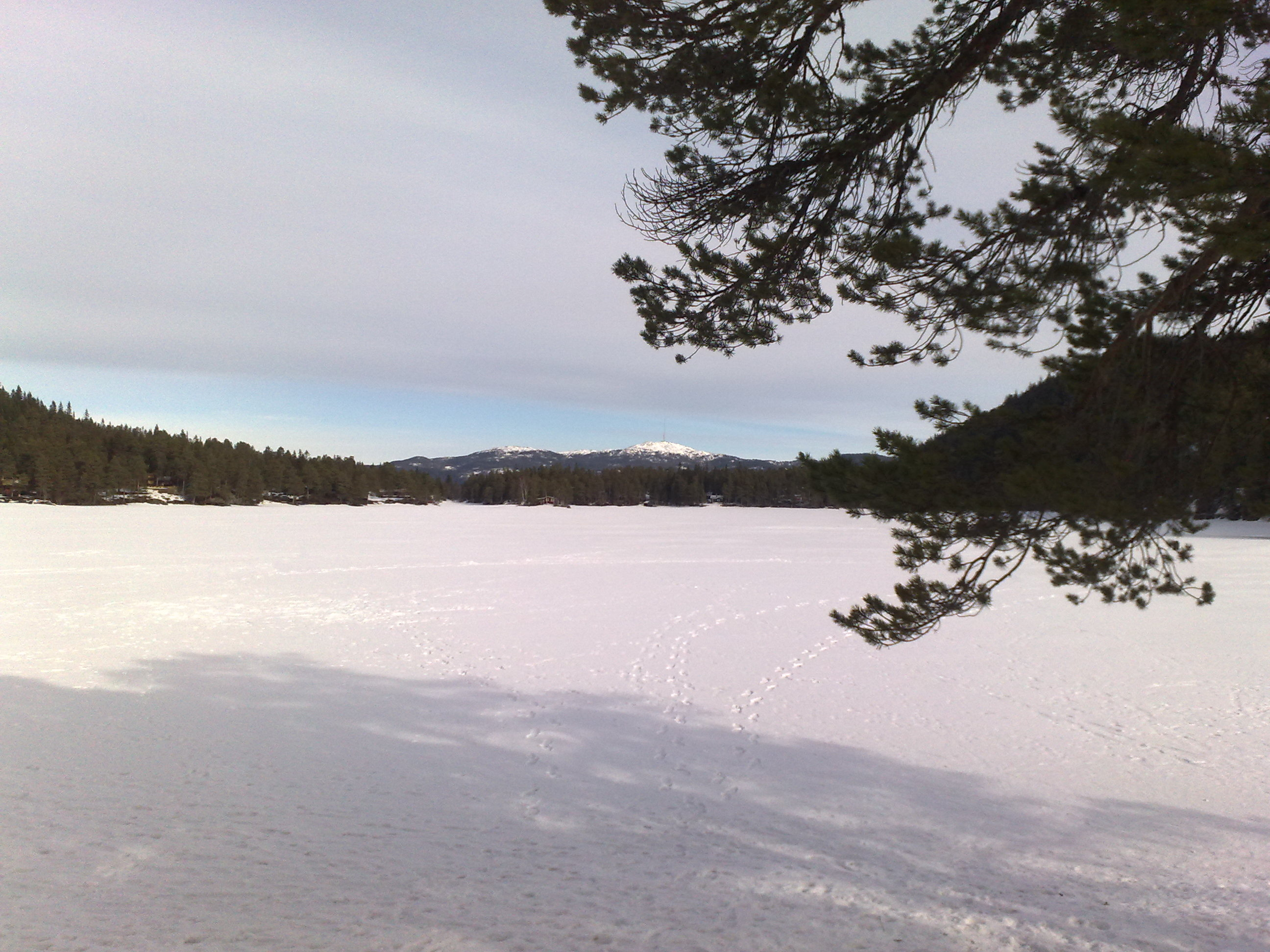 Bilde fra Benna i Melhus kommune. Bildet er tatt mot nordøst med Vassfjellet i bakgrunnen.